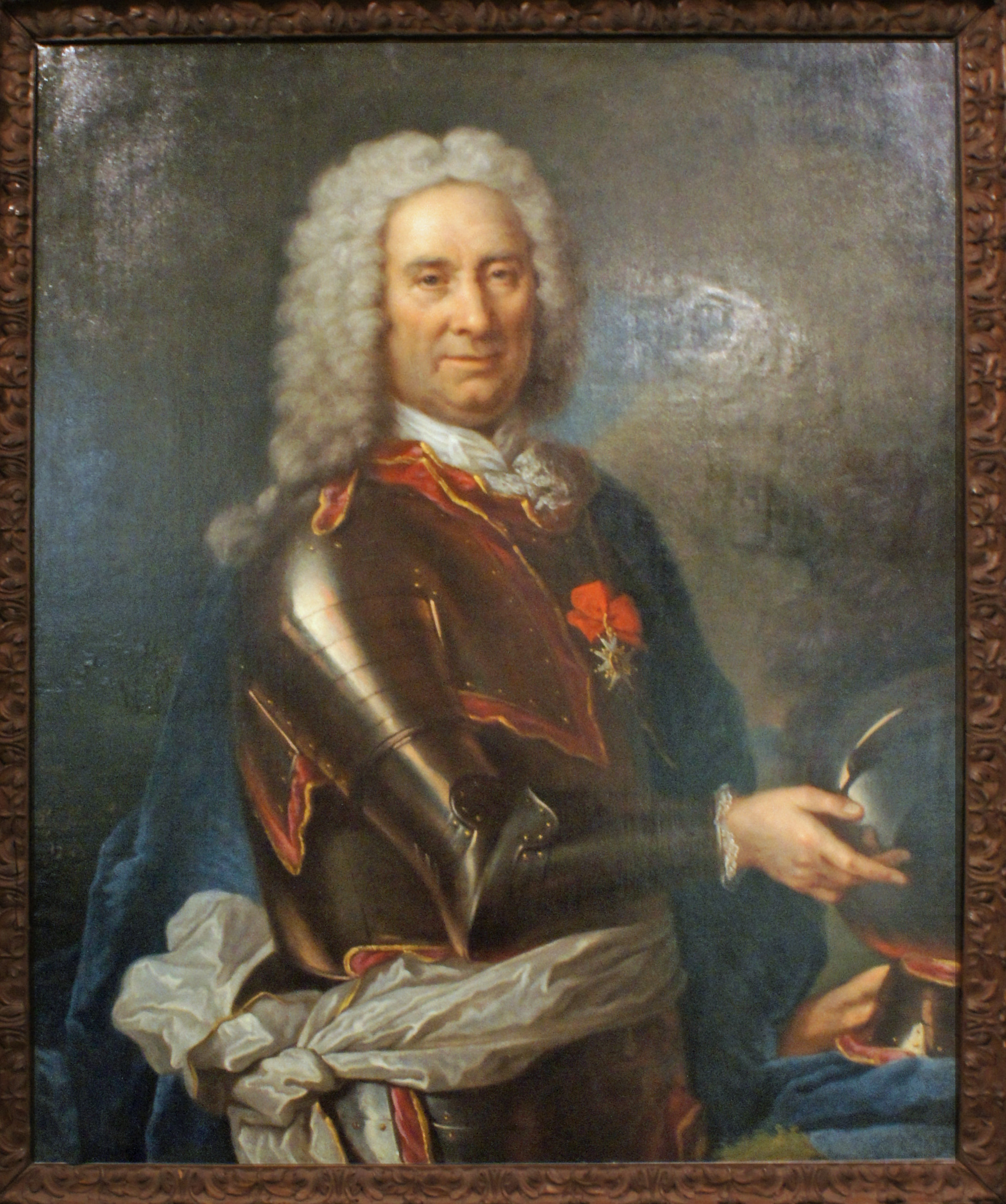 Cartel : Joseph de Glandié seigneur de Vareix et Lacapelle, lieutenant colonel du régiment Royal artillerie, chevalier de l'ordre de saint louis.